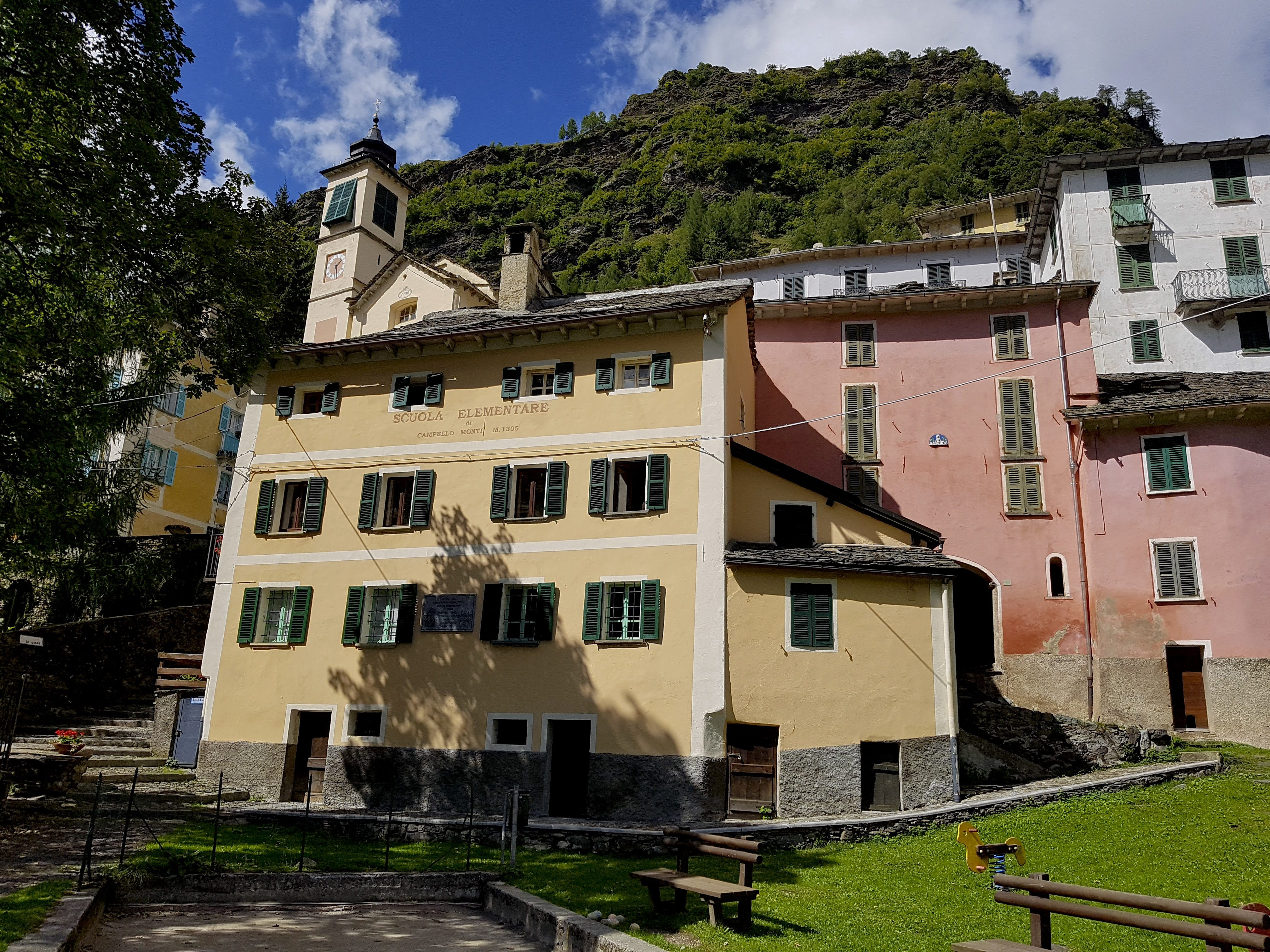 Ex scuola elementare vista dal ponte